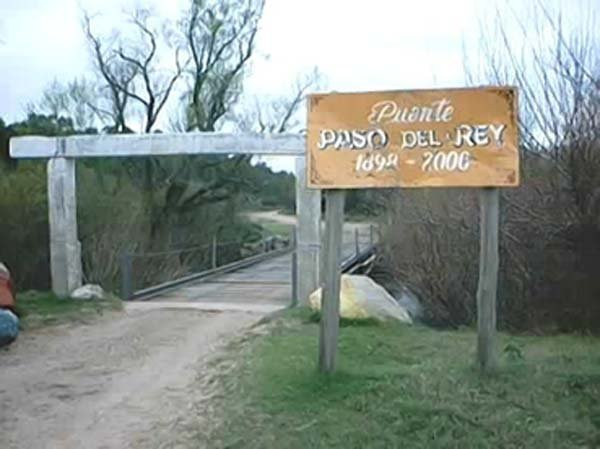 Puente del "Paso del Rey" Sarandí del Yí Uruguay